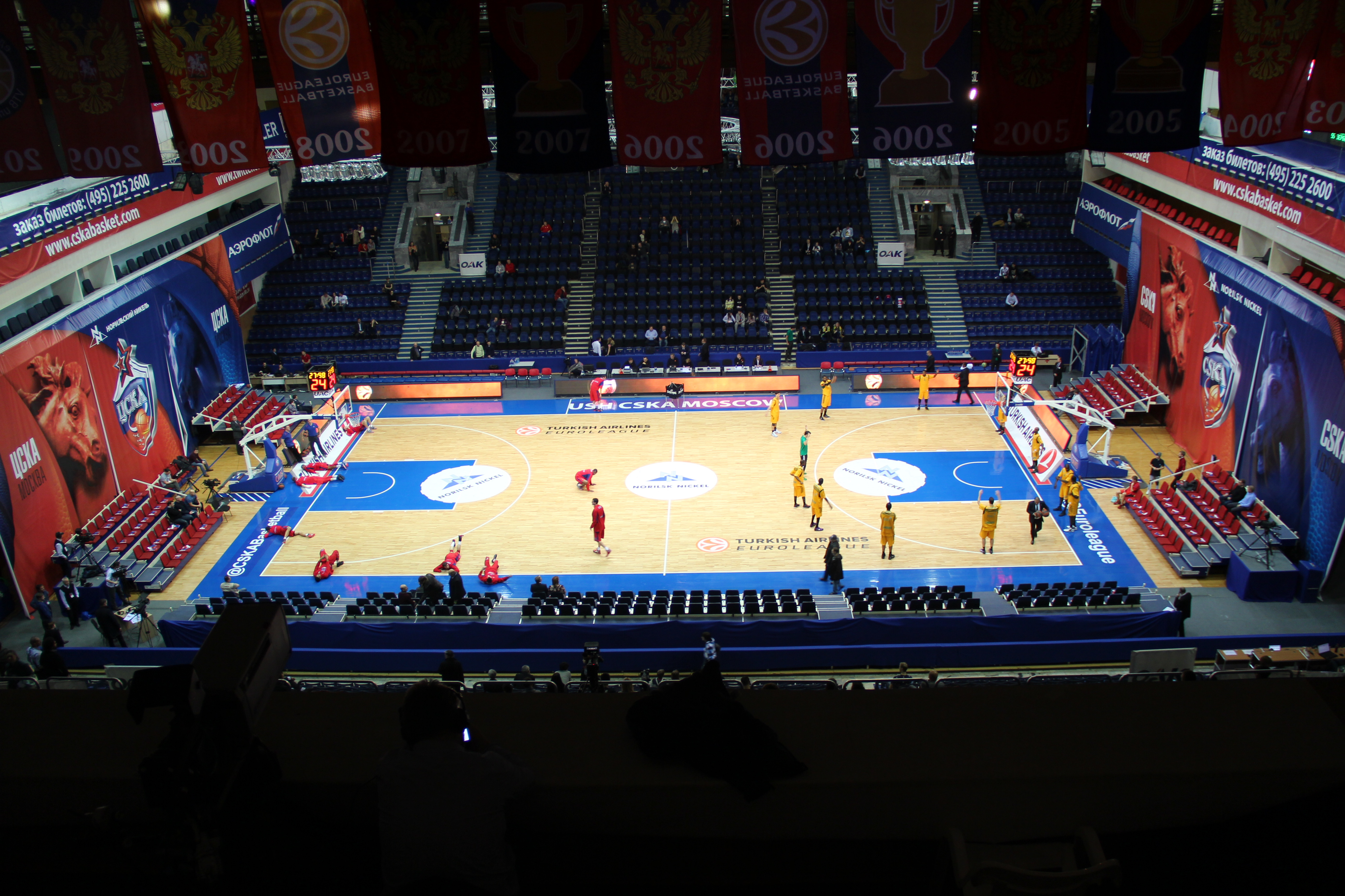 CSKA Universal Sports Hall Inside @ CSKA - Limoges 18 December 2014